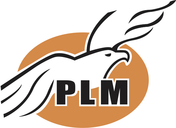 Emblema del antiguo Partido Liberal Mexicano (PLM) de México, el PLM fue liquidado como partido político en 2003 al perder su registro legal. Al ocurrir esto desapareció como entidad legal ante la ley mexicana y ninguna otra organización fue su sucesora en su denominación o emblema Seal of the ancient Mexican Libeal Party (PMT) of México, the PLM was existed untill 2003, when was disolved after lost his legal register. The PLM was disapered like a organization for the mexican electoral law and any other organization keep the name of seal.